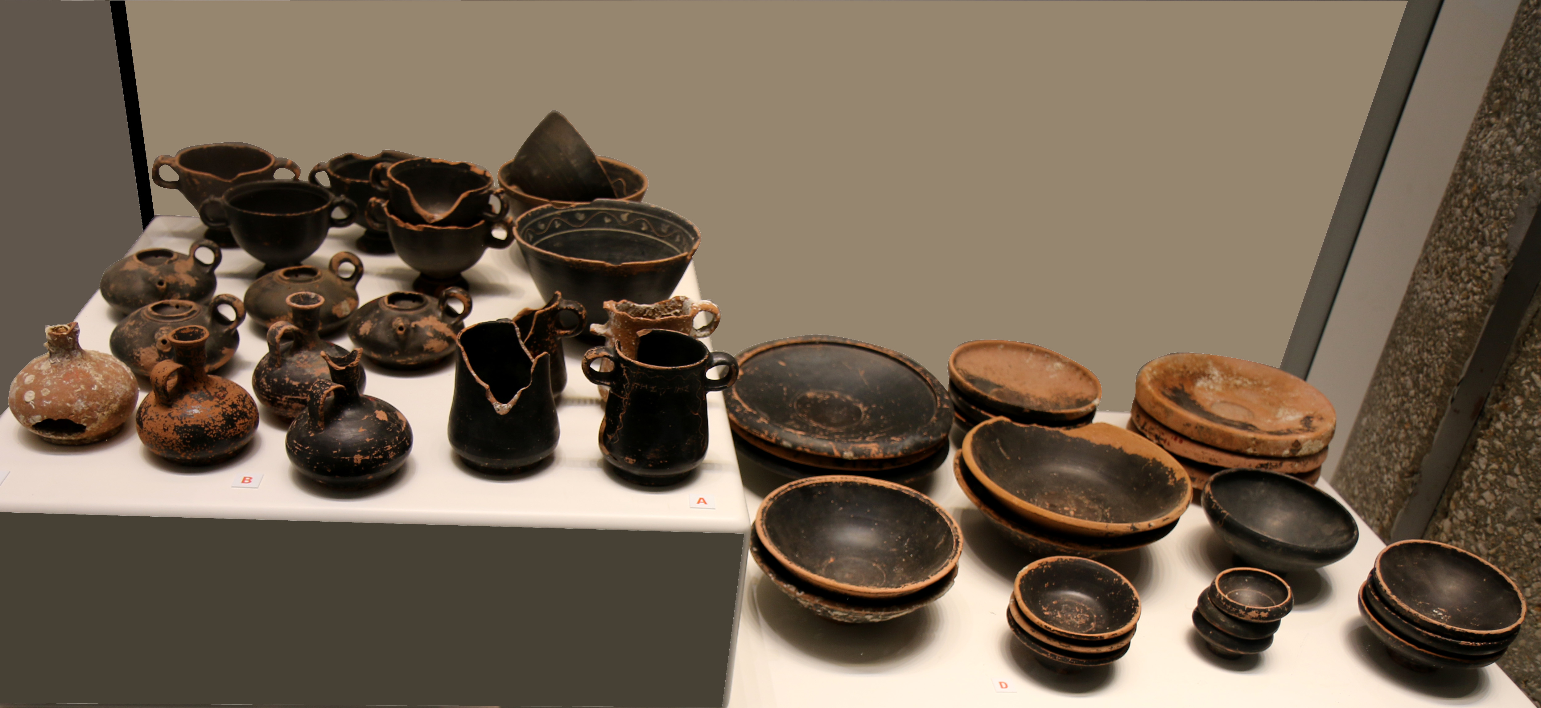 Vaisselle de l'épave du Grand Congloué 1, 210 à 180 av. J.-C.